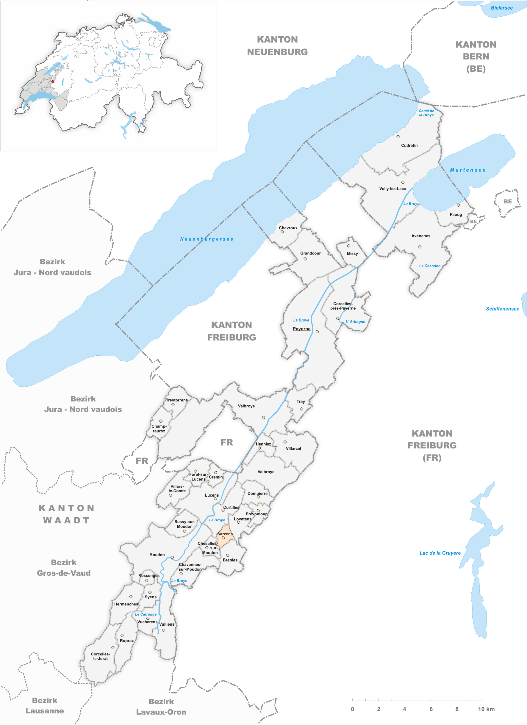 Municipality Sarzens